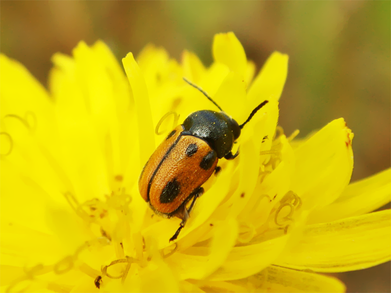 Cryptocephalus rugicollis Koleopteroa